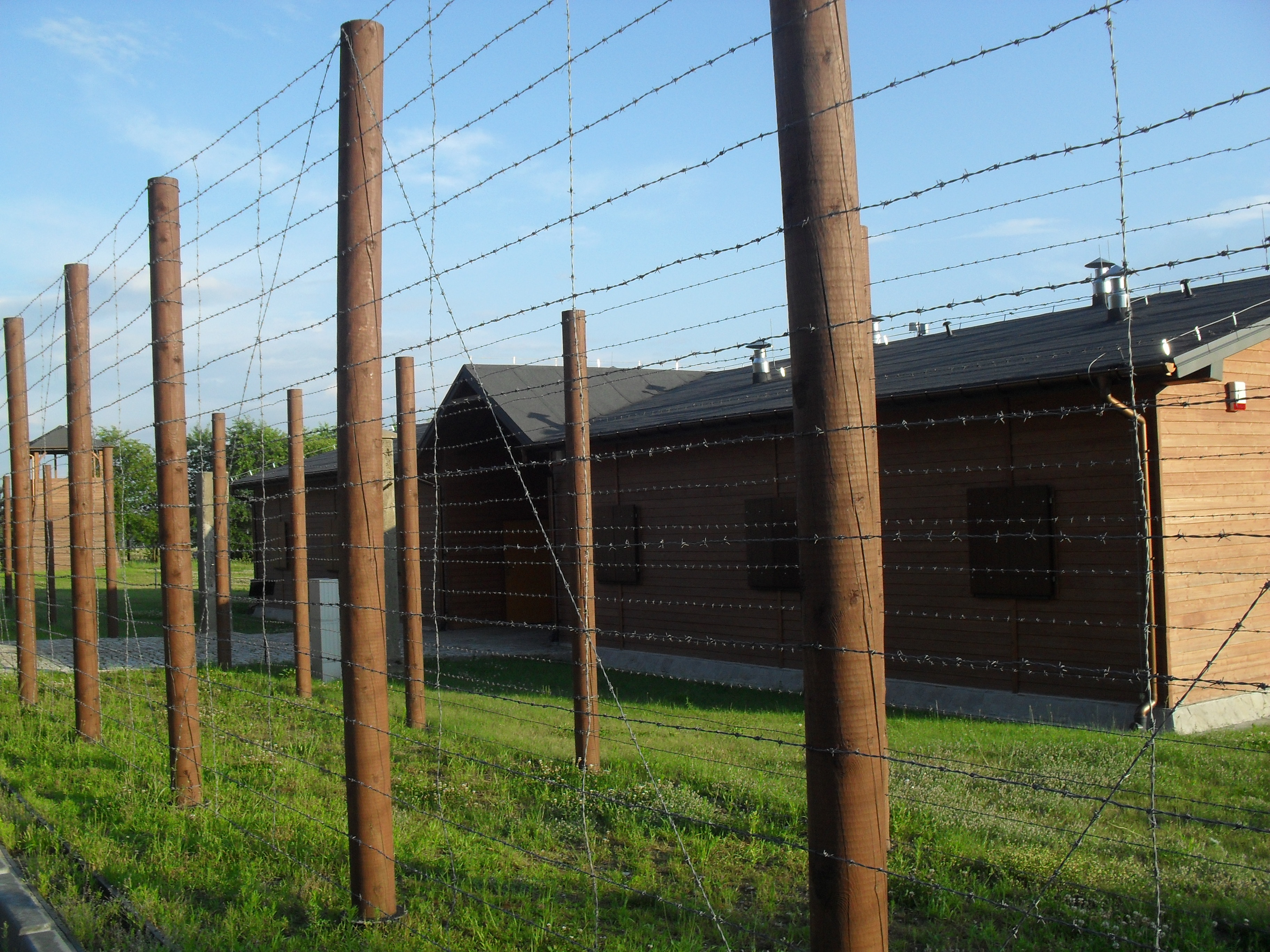 Góra Śmierci Rekonstrukcja (3)